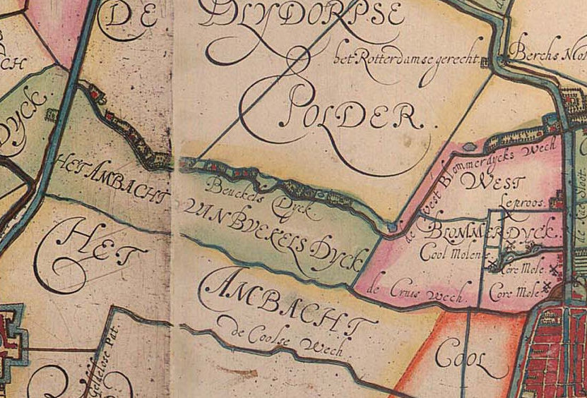 Detail uit de kaart van Schieland van 1611 van Floris Balthasarsz. van Berckenrode